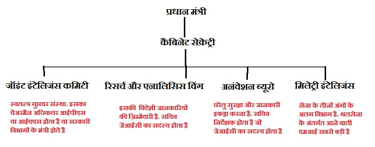 यह चित्र हिन्दी विकिपीडिया पर उपयोग किया गया है